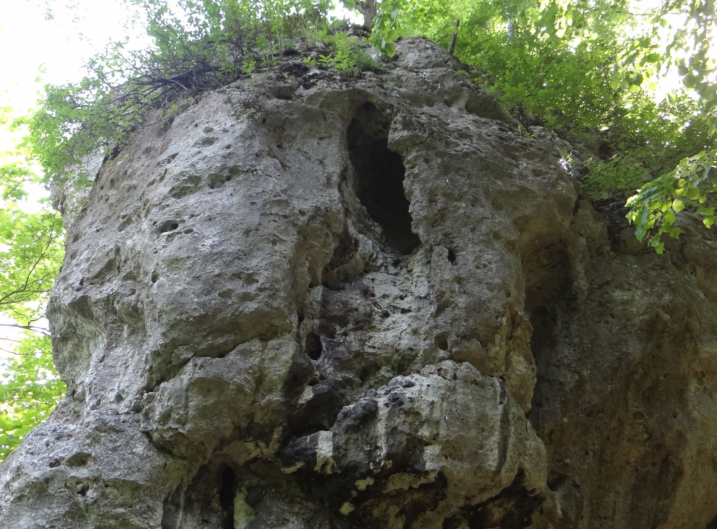 Otwór skalnej ambony w skale Oczko w Parku Jurajskim koło Smolenia